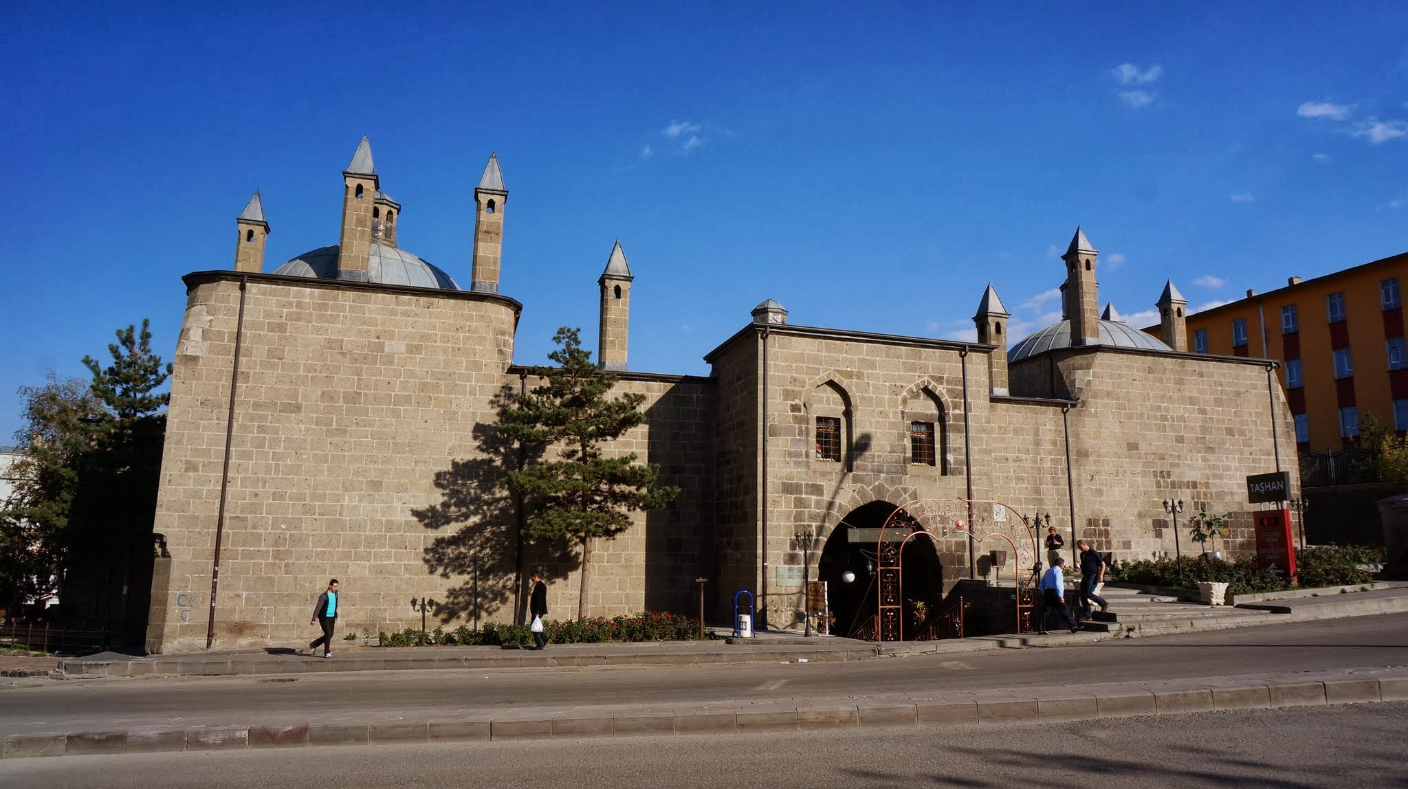 Erzurum, Turkey